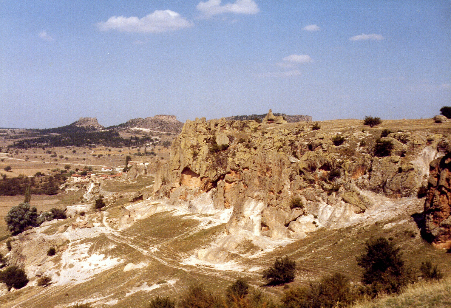 Akropolis von Midasstadt bei Afyon, Zentraltürkei